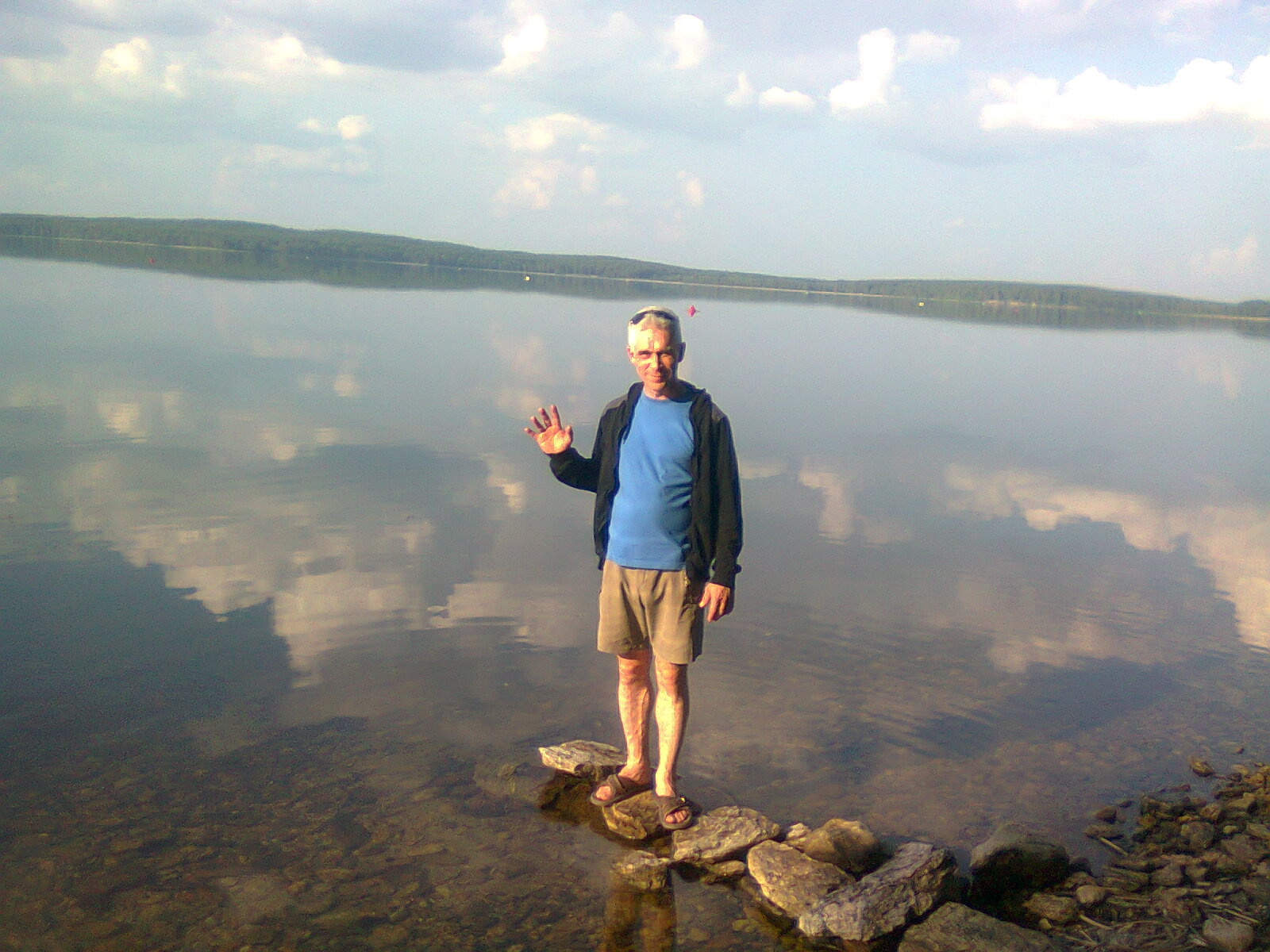 Озеро Синара3